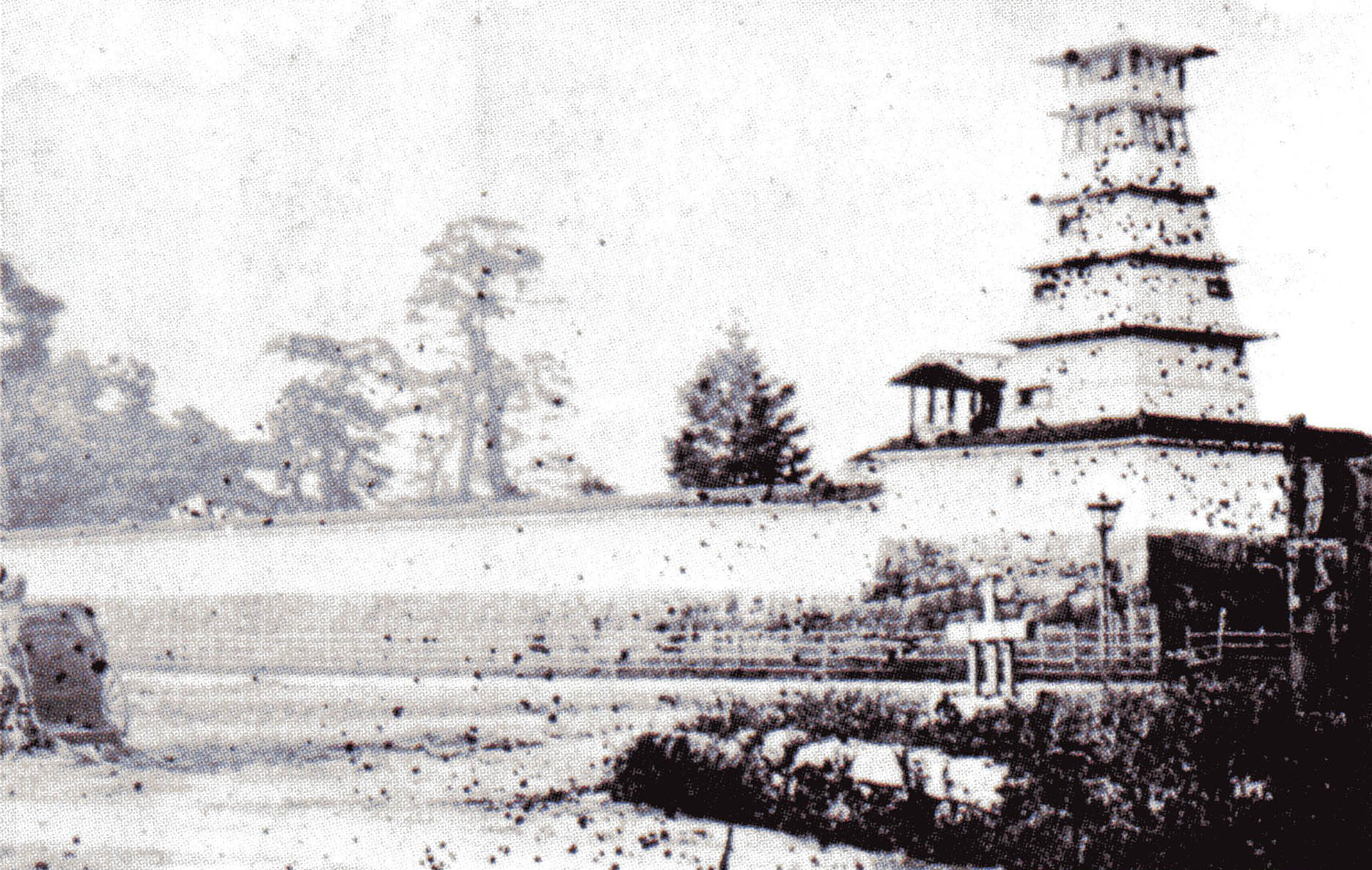 二条城